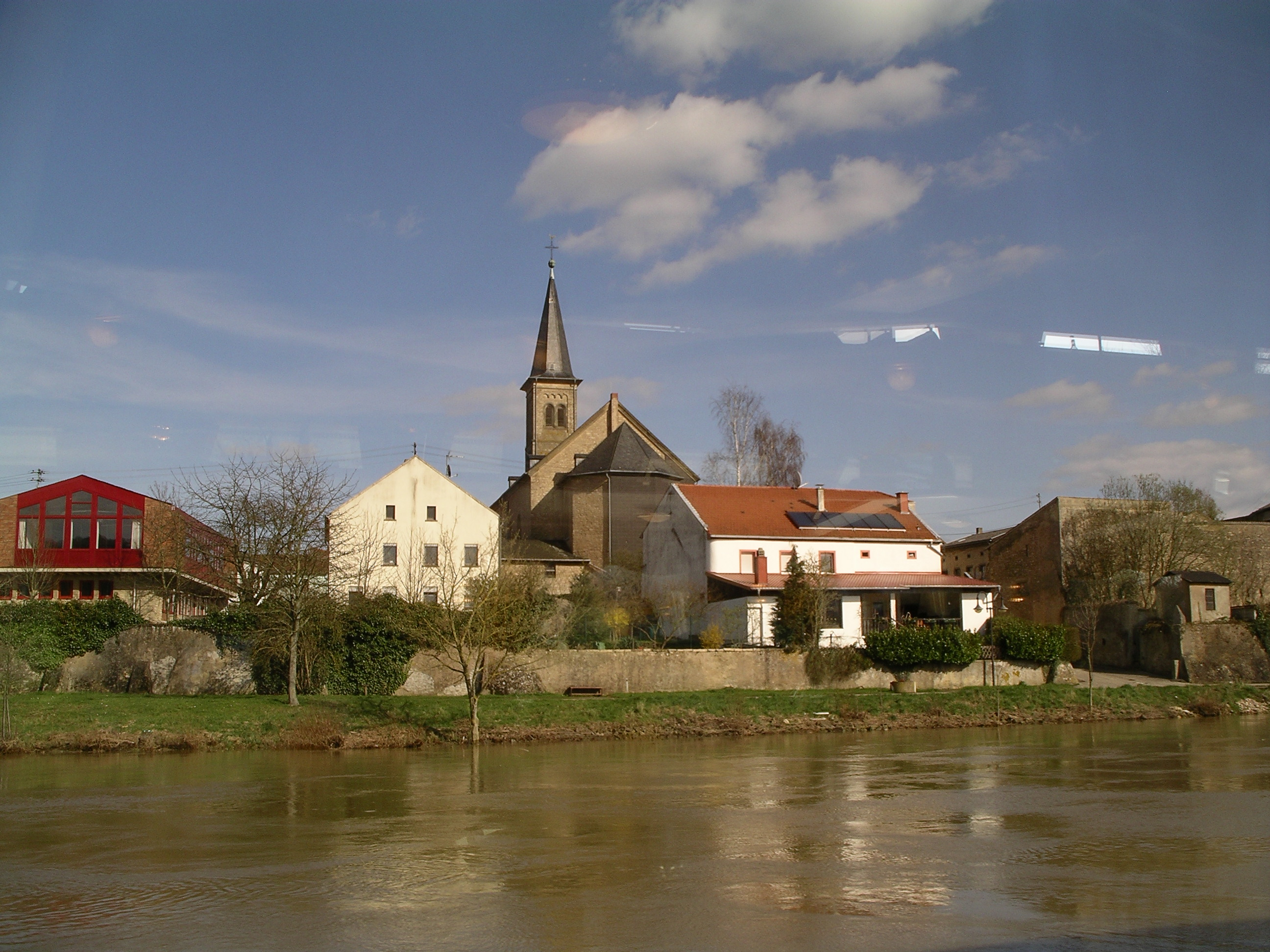 Perl, Besch von der Mosel her gesehen